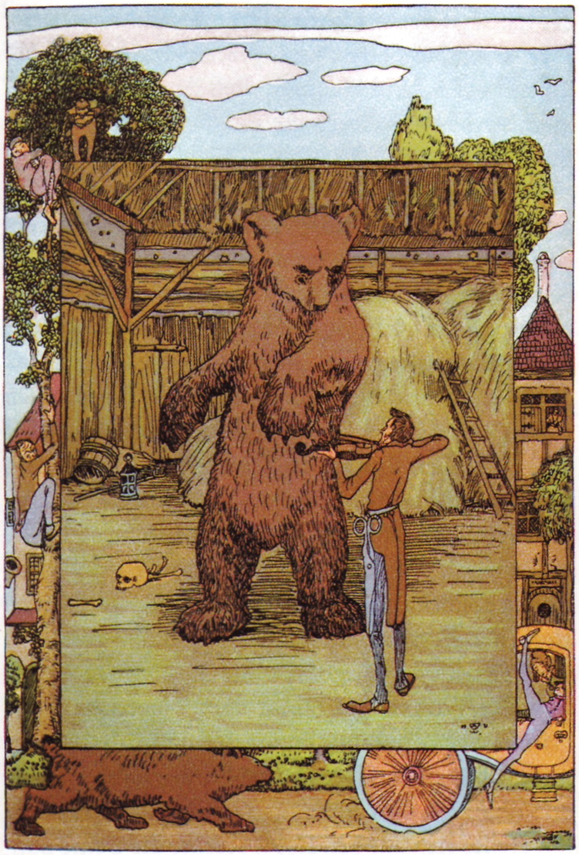 Illustration des Grimm'schen Märchens „Vom klugen Schneiderlein“ (KHM 114) von Heinrich Vogeler